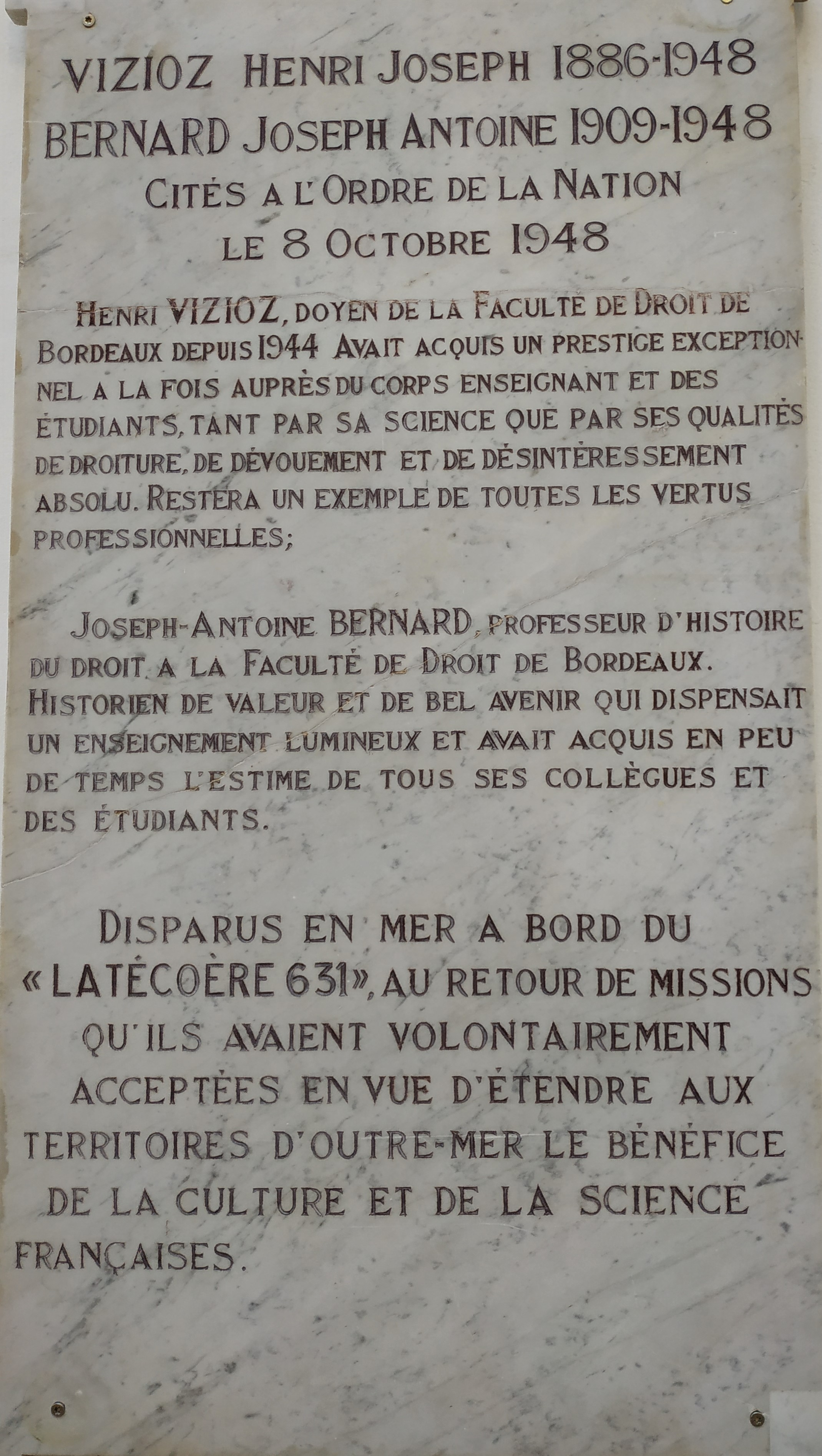 Plaque commémorative de l'accident d'avion Latécoère 631 dans lequel ont périt le 8 octobre 1948 le doyen Henri Vizioz et le professeur Joseph-Antoine Bernard. (Faculté de droit de Bordeaux - place Pey-Berland)